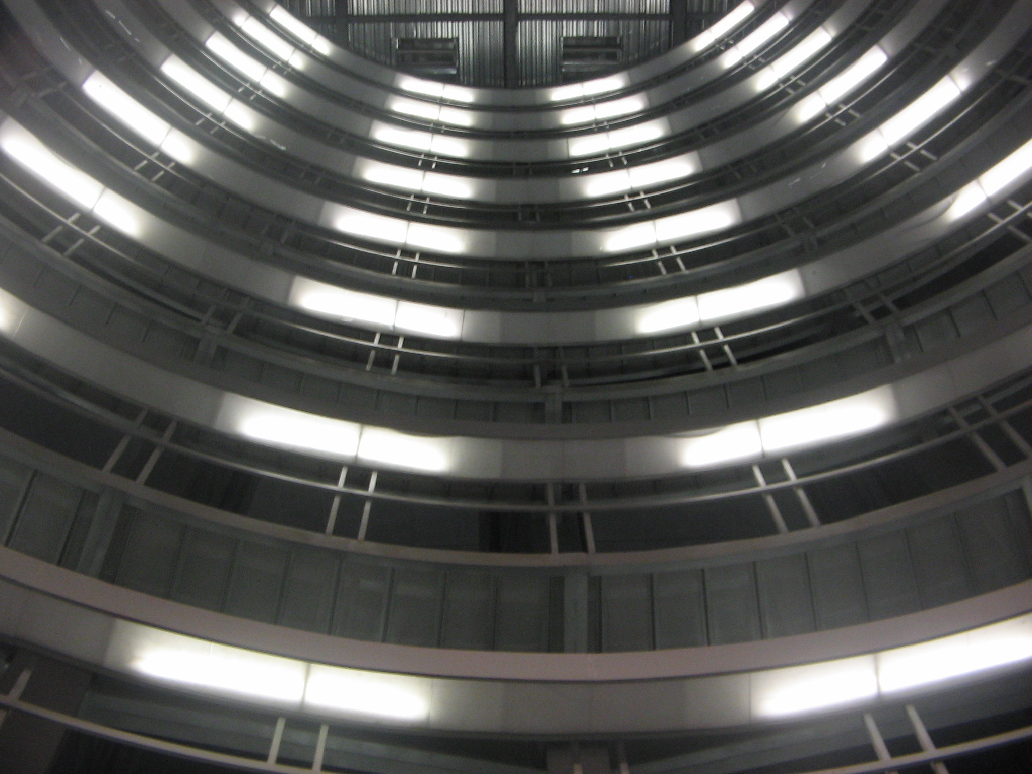 Esatció de Llefià